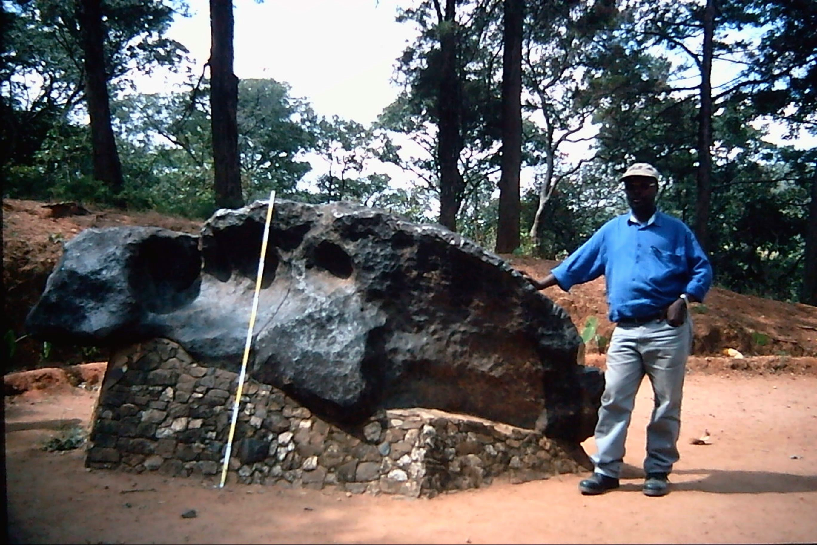 Meteorite of Mbozi in Tanzania